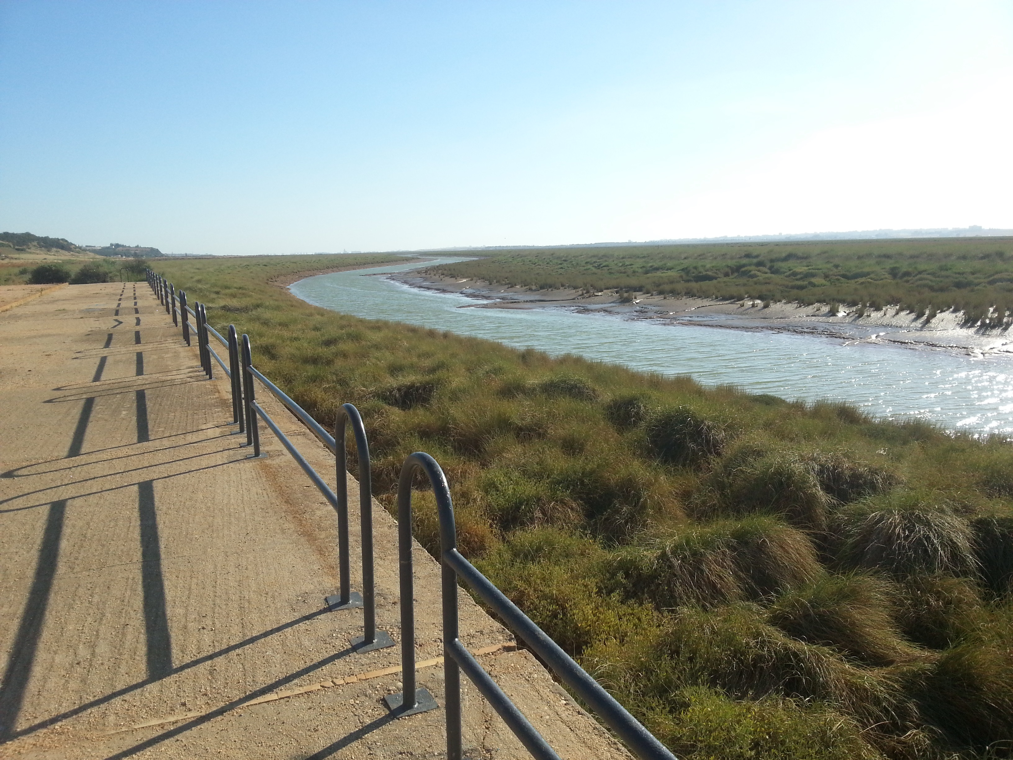 Vista del Puerto histórico de Moguer (Nominado posteriormente de la Ribera).